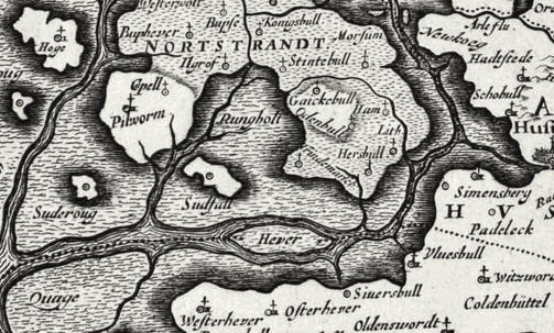 Rungholt nord for halvøen Ejdersted